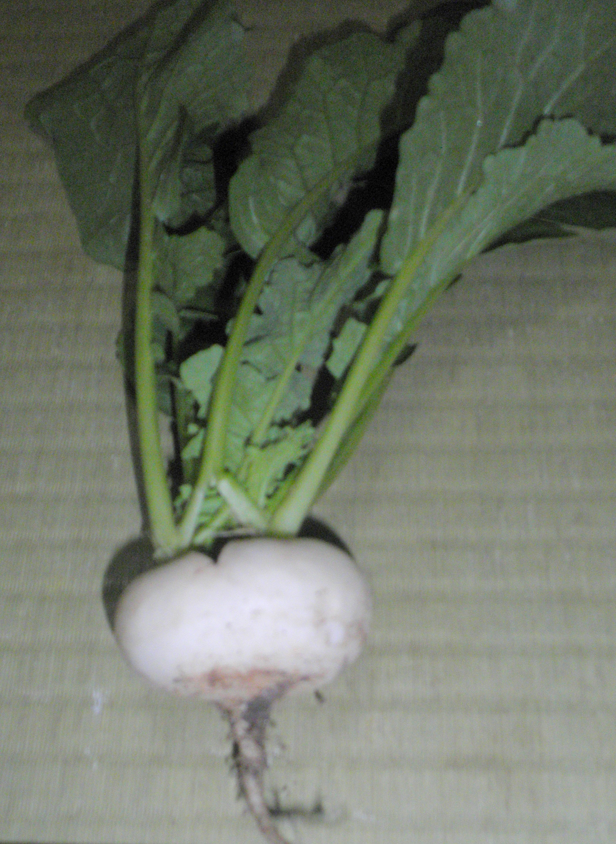 なにわの伝統野菜の天王寺蕪。大阪市内の小学校で栽培されたもの。